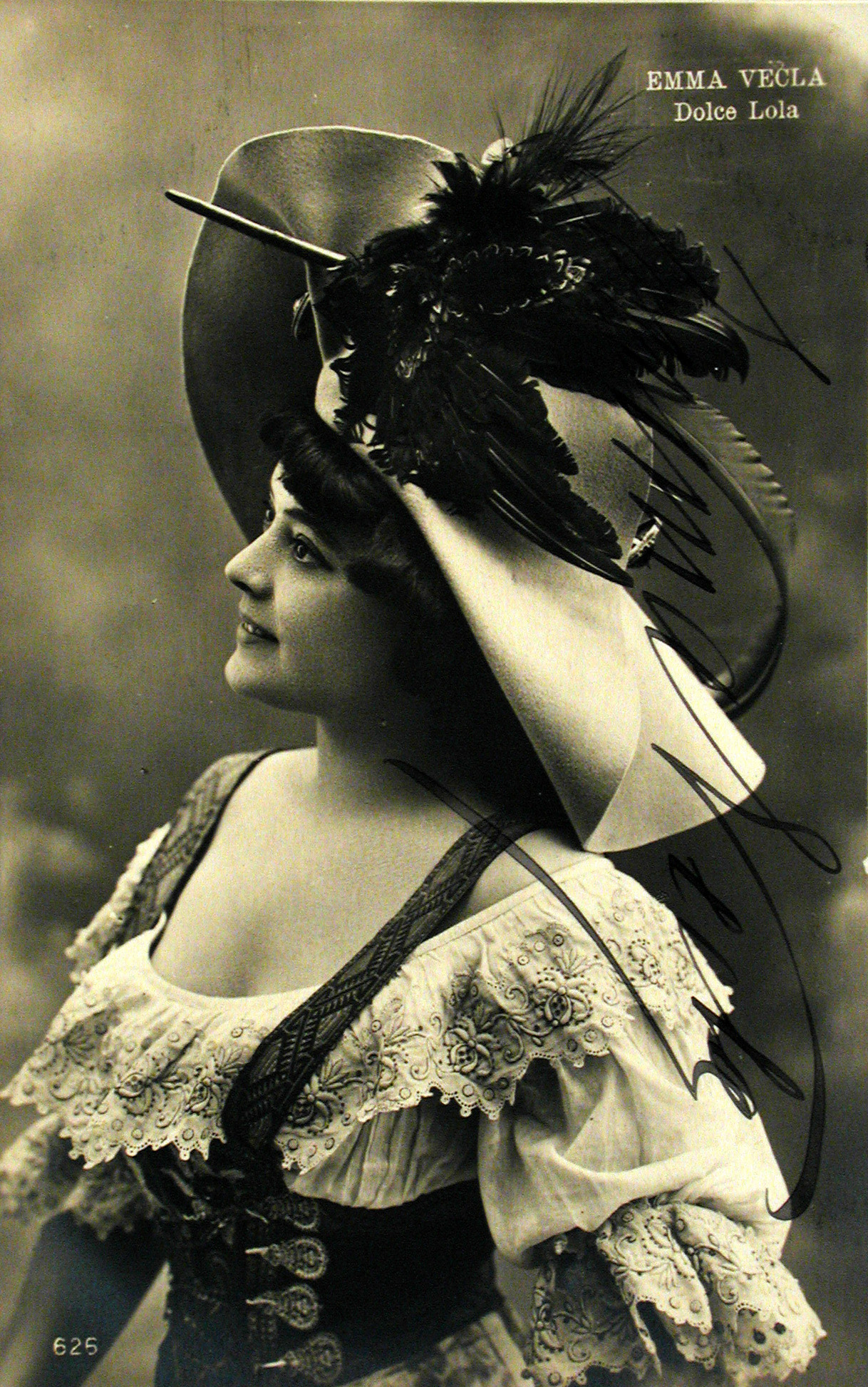 Cartolina numerata n° 625, autografata sul lato destro. La cantante di operetta Emma Vecla, con ampio cappello e costume di scena, nell'interpretazione del personaggio di Lola.